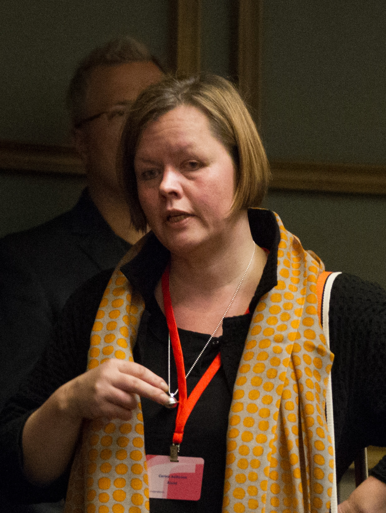 Carina Aaltonen vid Nordiska rådets session i Helsingfors.